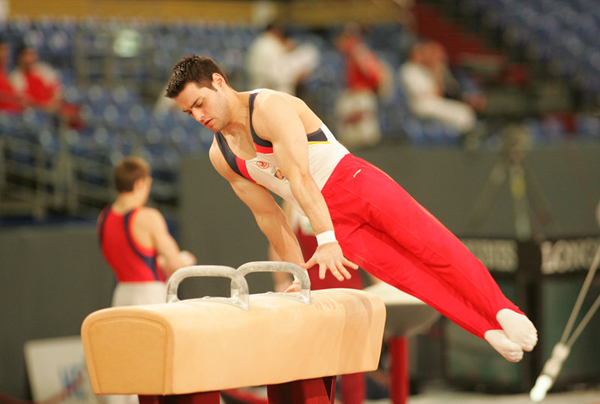 El gimnasta Iván San Miguel en el Campeonato de Europa, en Ámsterdam 2007.